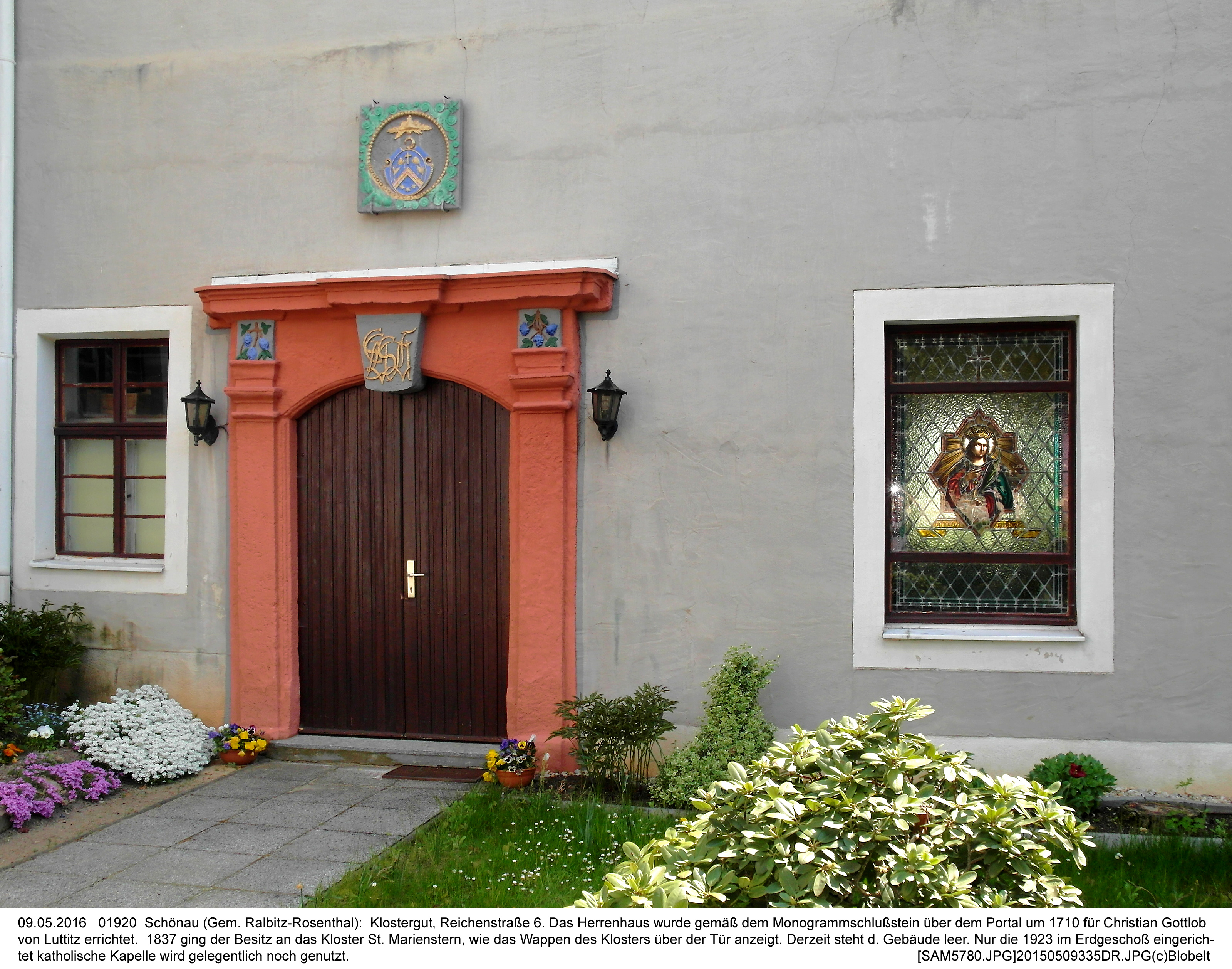 09.05.2016 01920 Schönau (Gem. Ralbitz-Rosenthal): Klostergut, Reichenstraße 6. Das Herrenhaus wurde gemäß dem Monogrammschlußstein über dem Portal um 1710 für Christian Gottlob von Luttitz errichtet. 1837 ging der Besitz an das Kloster St. Marienstern, wie das Wappen des Klosters über der Tür anzeigt. Derzeit steht d. Gebäude leer. Nur die 1923 im Erdgeschoß eingerichtet katholische Kapelle wird gelegentlich noch genutzt. [SAM5780.JPG]20150509335DR.JPG(c)Blobelt